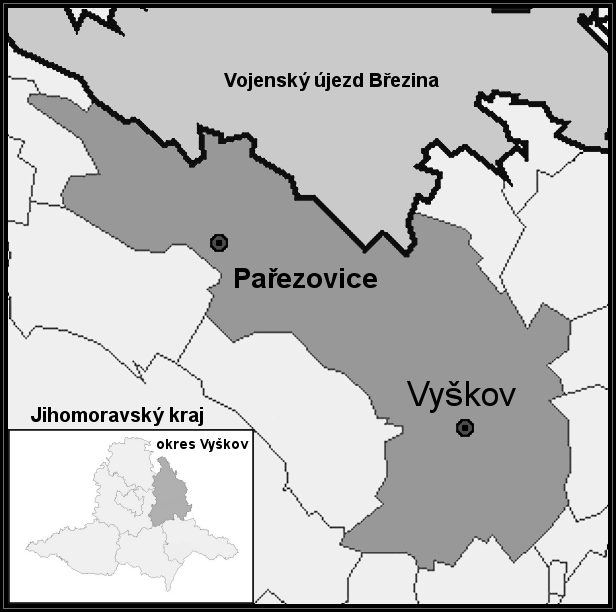 Pařezovice (Vyškov - Czech republic)